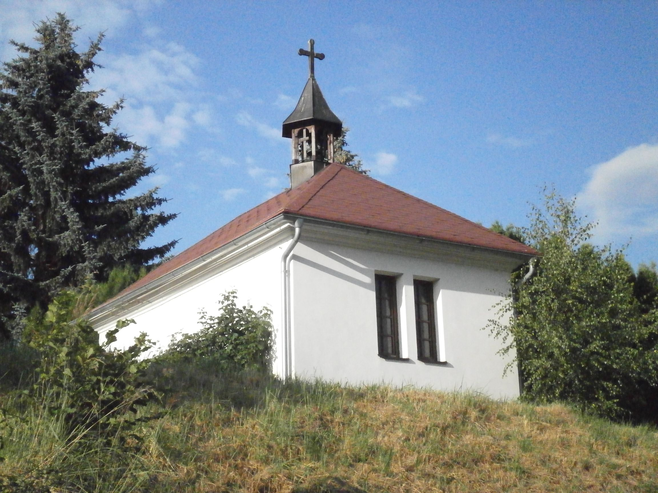 Dolní Brusnice - hřbitovní kaplička